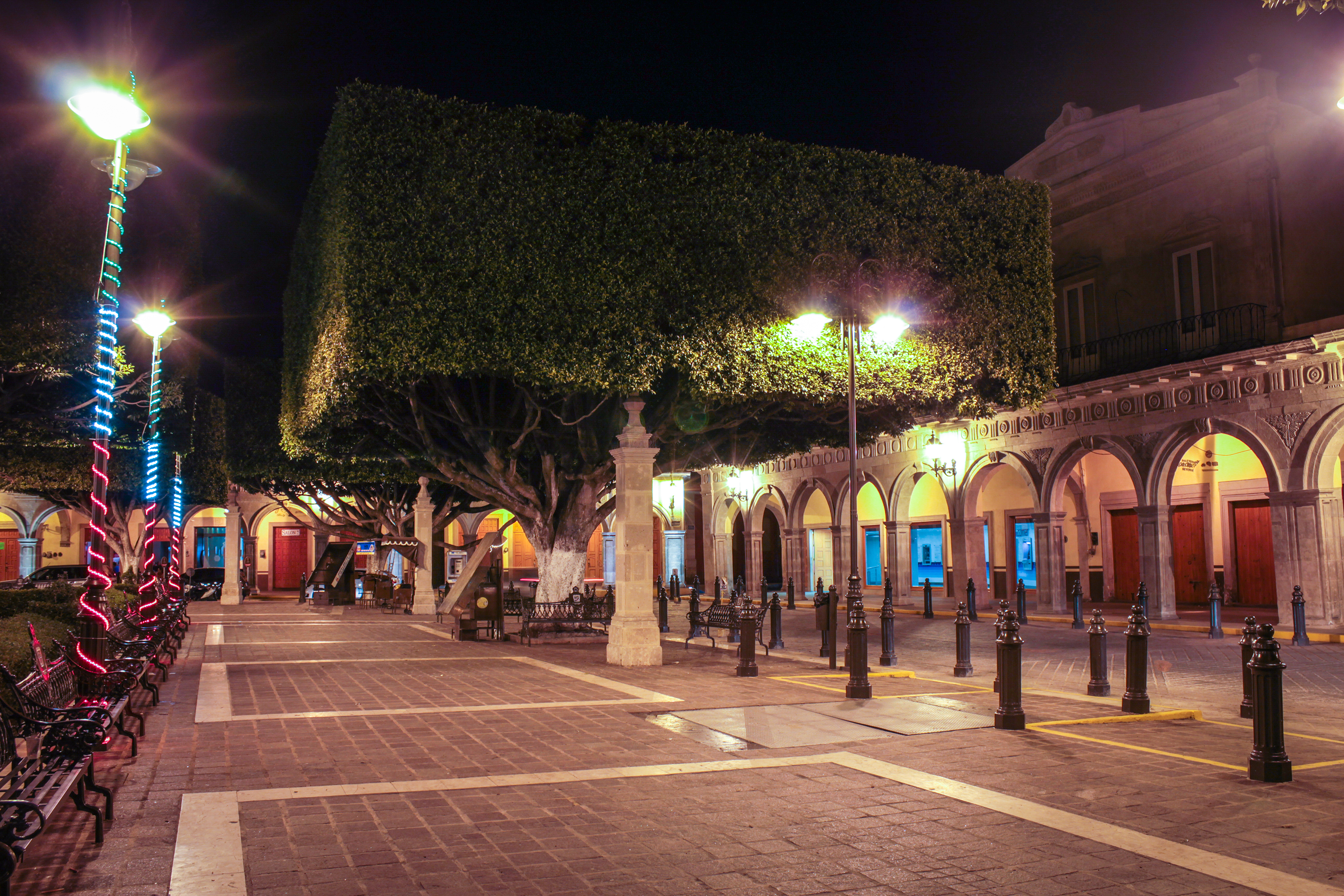 Jardín principal de noche